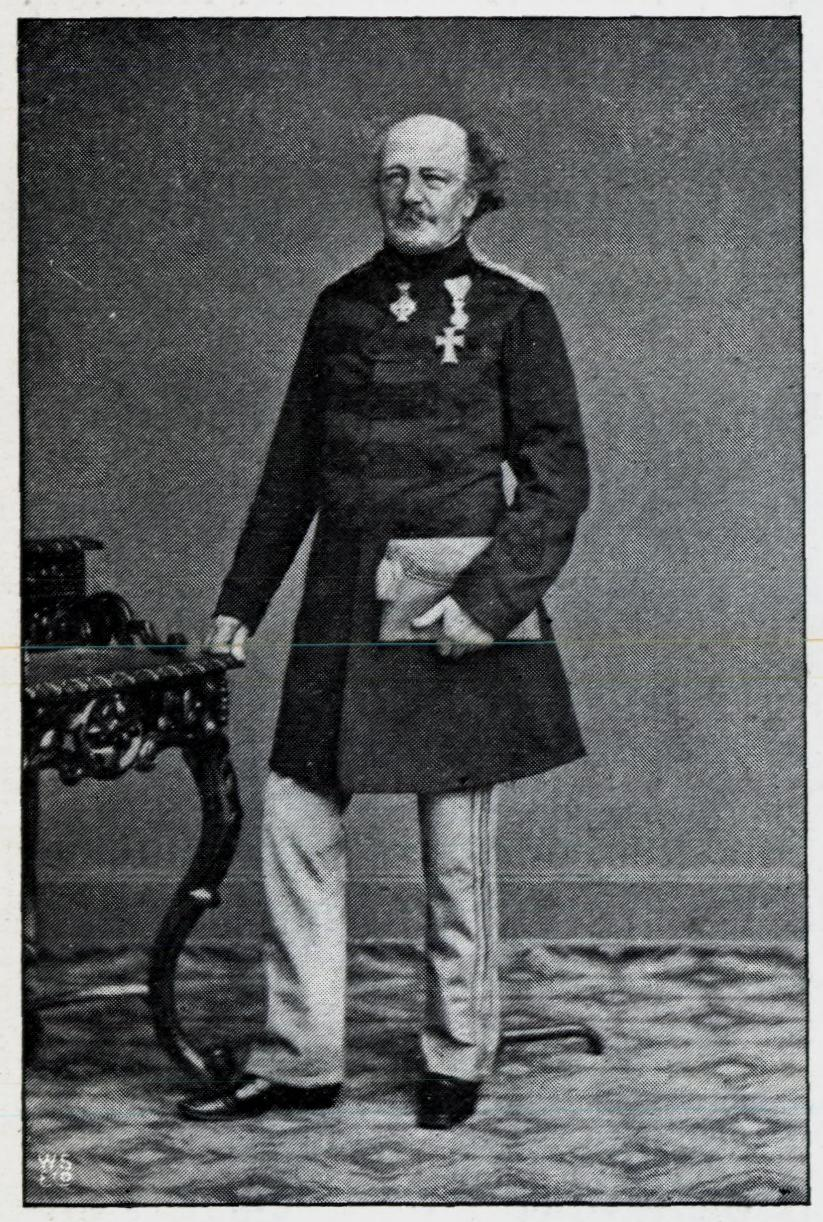 Illustrasjon hentet fra boken "En Christianiensers Erindringer fra 1850- og 60-Aarene" av Nielsen, Yngvar og utgitt av Gyldendal (Kristiania, 1910) Depicted person: General Wilhelm Theodor Wegener Nielsen (1793-1882)